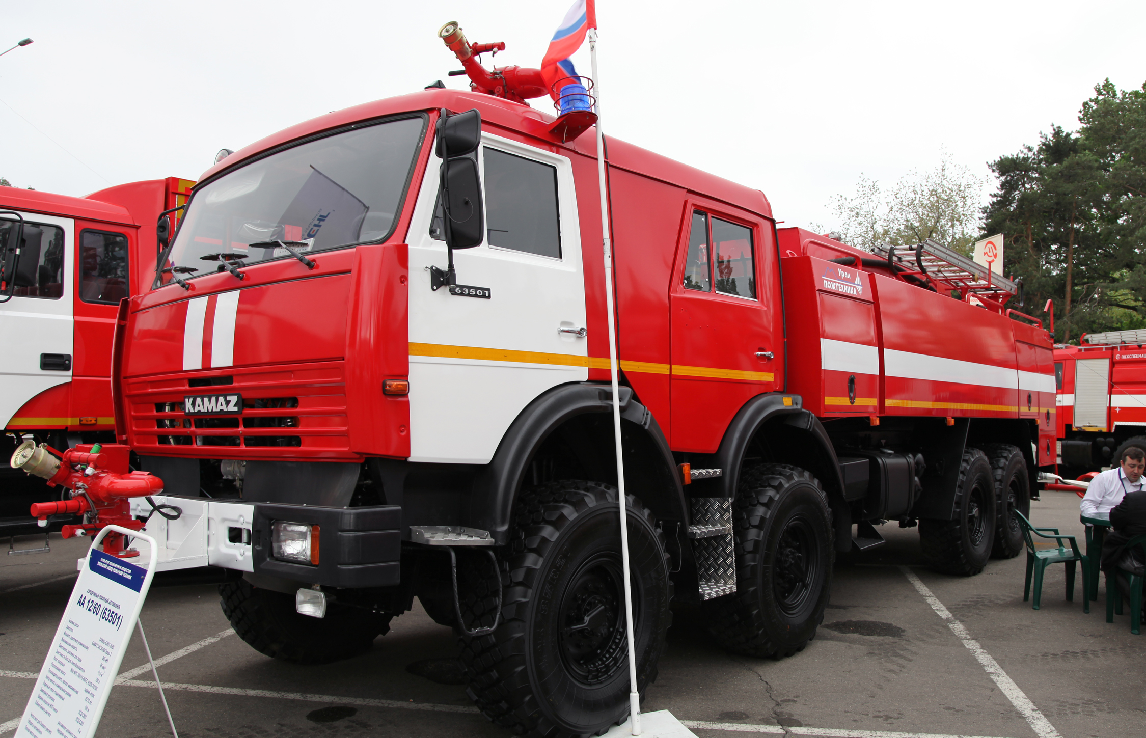 Аэродромный пожарный автомобиль АА 12/60 на шасси КАМАЗ-63501 (Airfield fire fighting vehicle AA 12/60 on KAMAZ-63501 chassis)